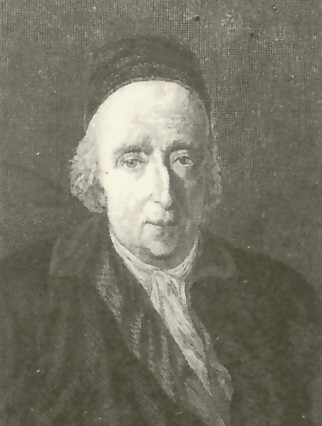 Johann van Ghelen (1645-1721). Xylographie nach einem Gemälde von Johann Jakob Schuppen